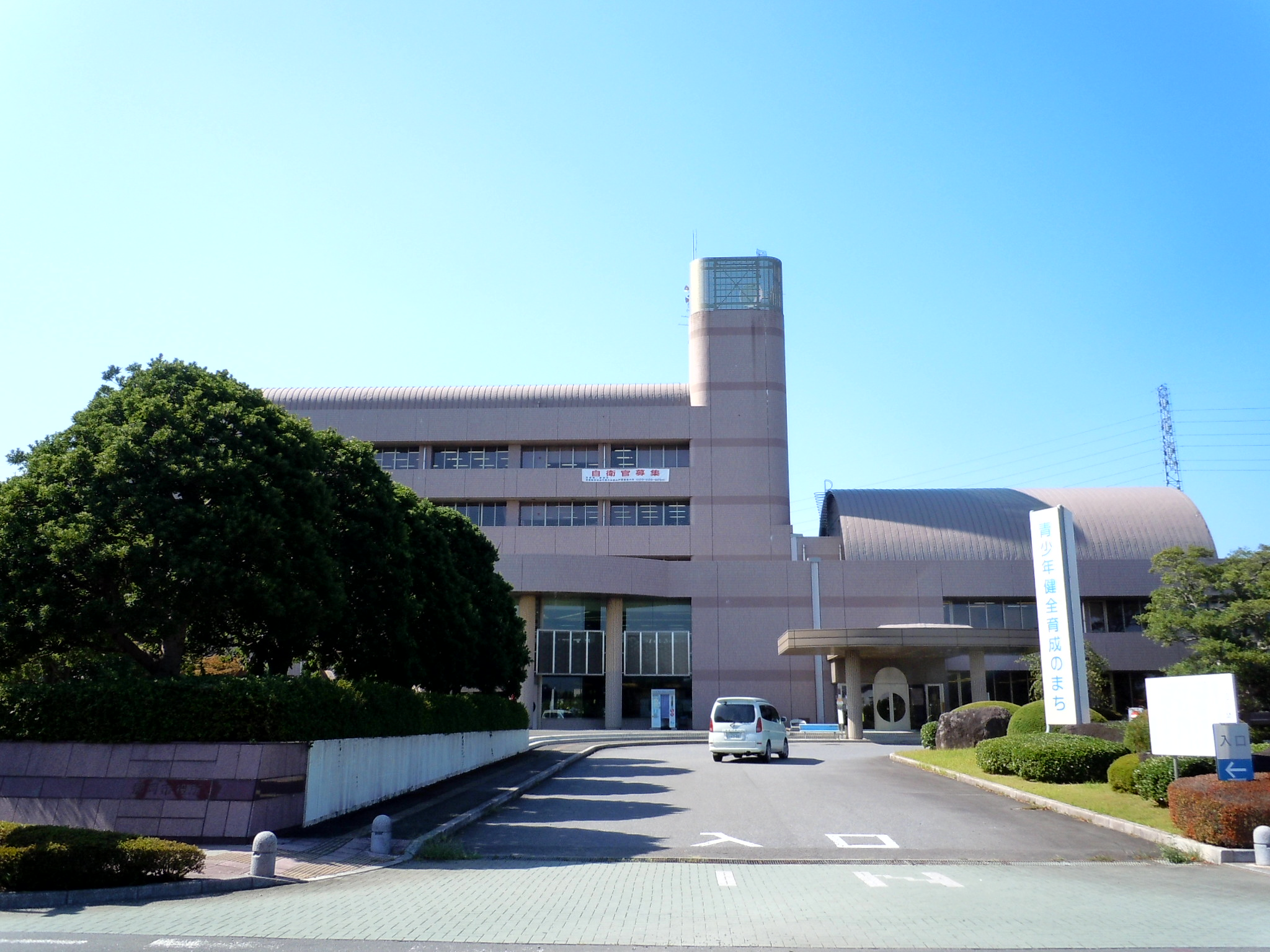 那珂市役所